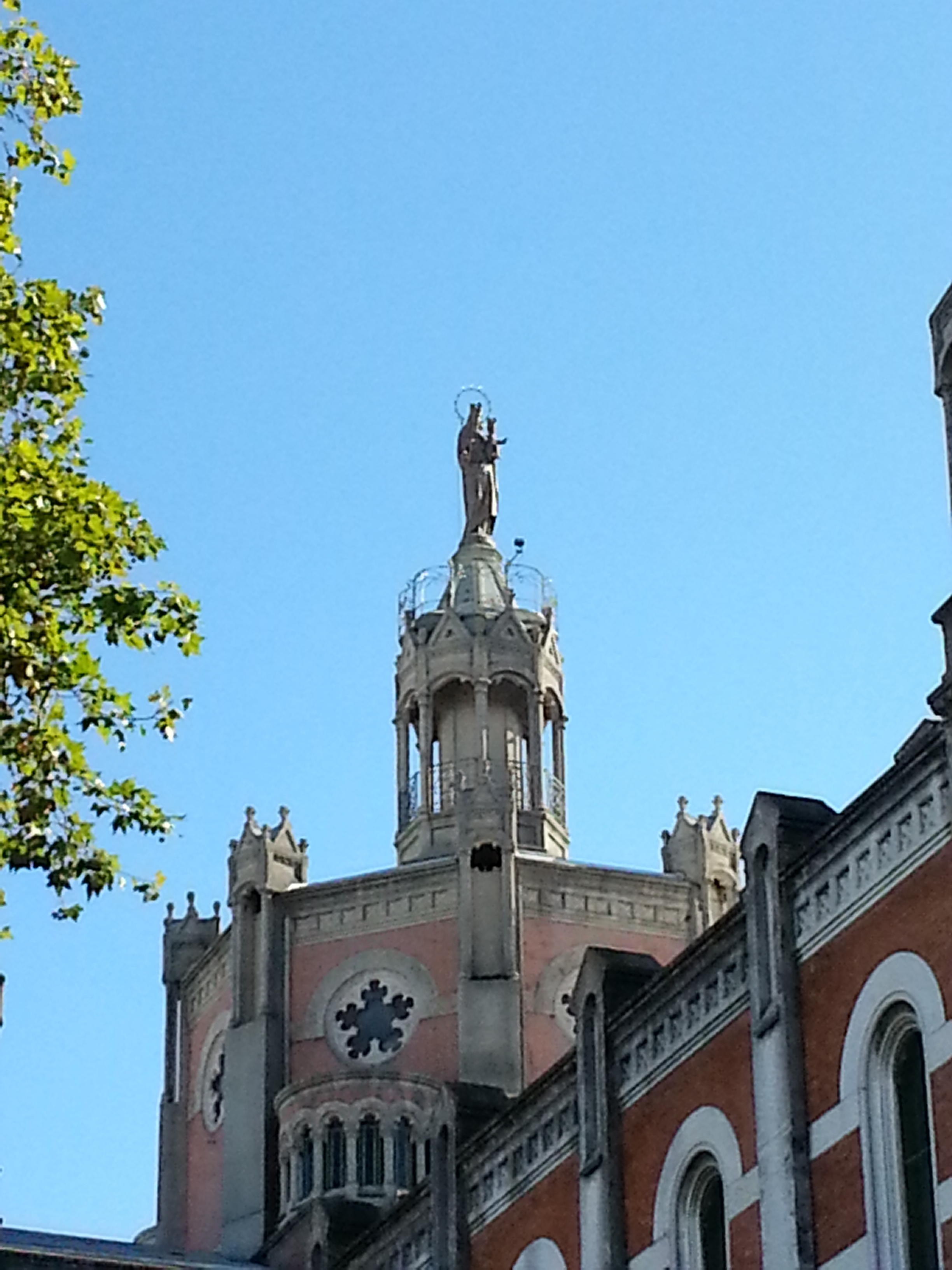 Cúpula de la Basílica María Auxiliadora y San Carlos, coronada por una linterna que sustenta una imagen de María Auxiliadora de cinco metros de altura.